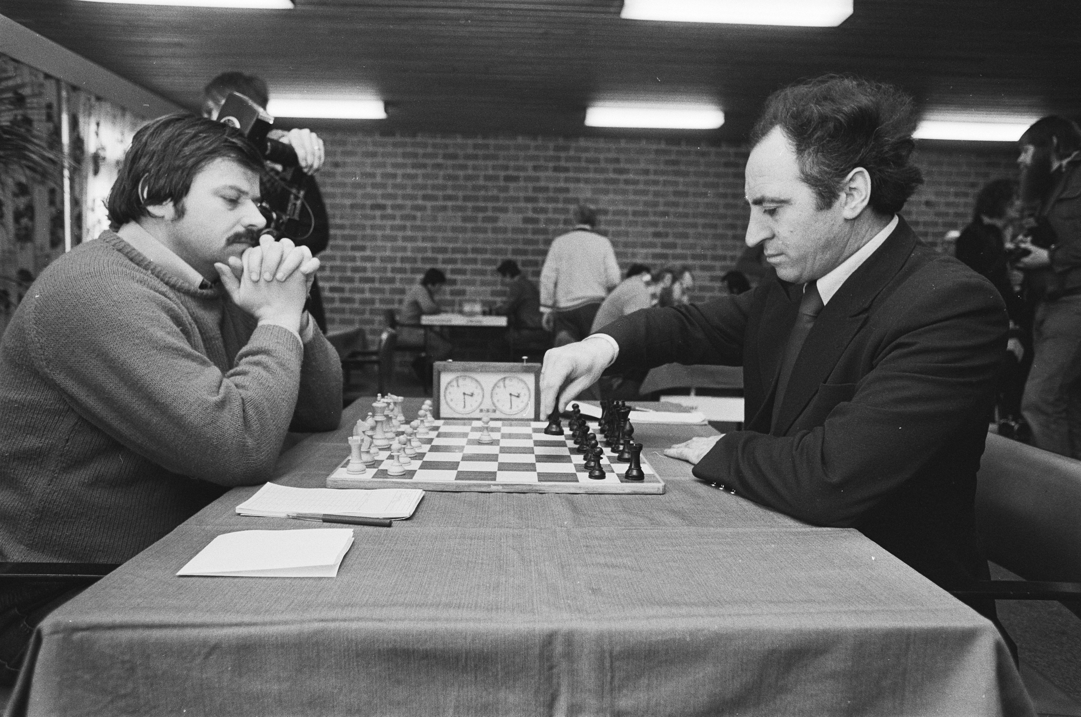 Collectie / Archief : Fotocollectie Anefo Reportage / Serie : [ onbekend ] Beschrijving : Hoogovens schaaktoernooi, 1e ronde; Hort (l) tegen Polugajevsky Datum : 19 januari 1979 Locatie : Wijk aan Zee Trefwoorden : schaken, toernooien Persoonsnaam : Hort, Vlastimil, Poloegajevski, Lev Instellingsnaam : Hoogovenschaaktournooi Fotograaf : Croes, Rob C. / Anefo Auteursrechthebbende : Nationaal Archief Materiaalsoort : Negatief (zwart/wit) Nummer archiefinventaris : bekijk toegang 2.24.01.05 Bestanddeelnummer : 930-0811